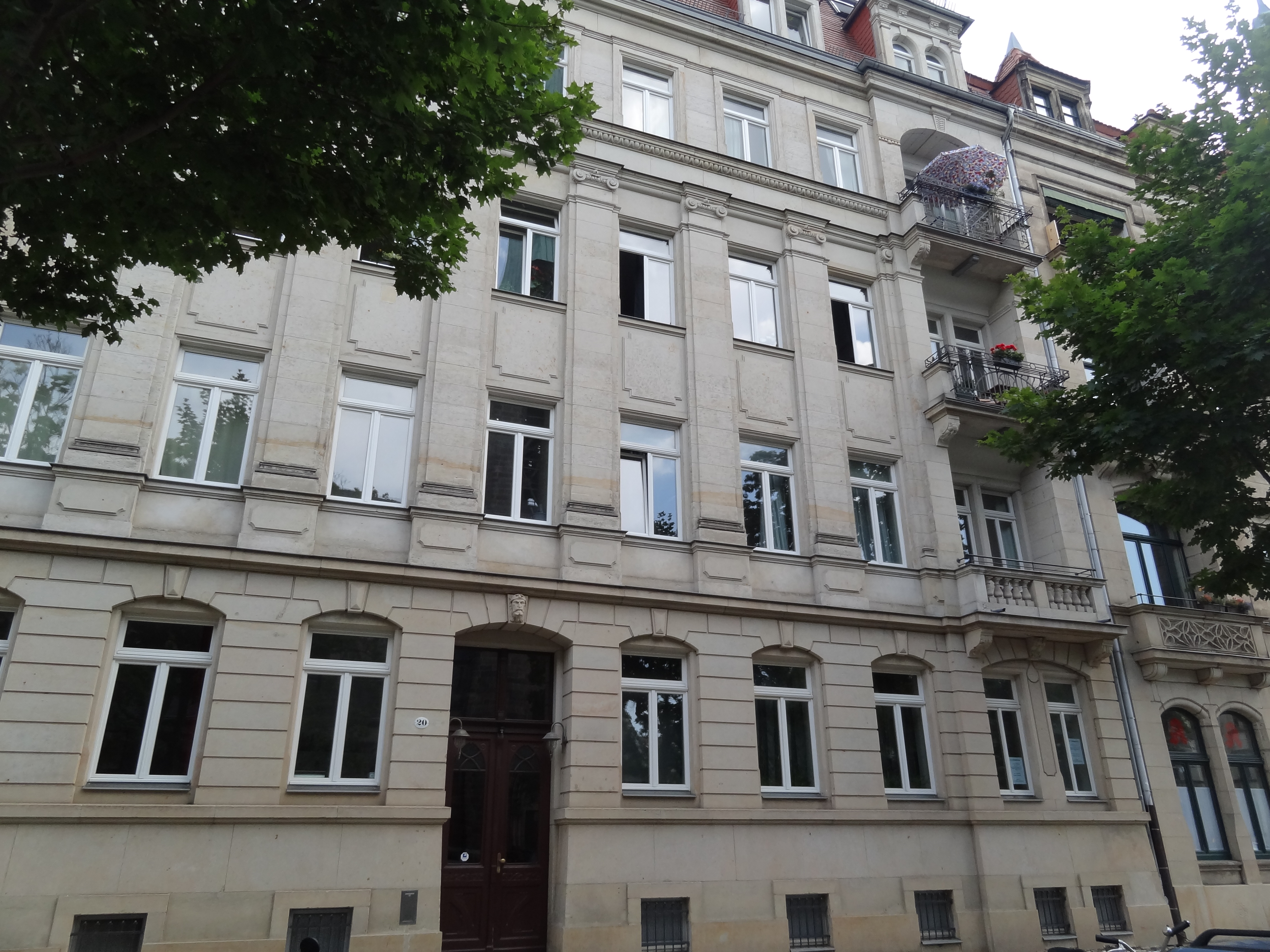 Ansicht Straße